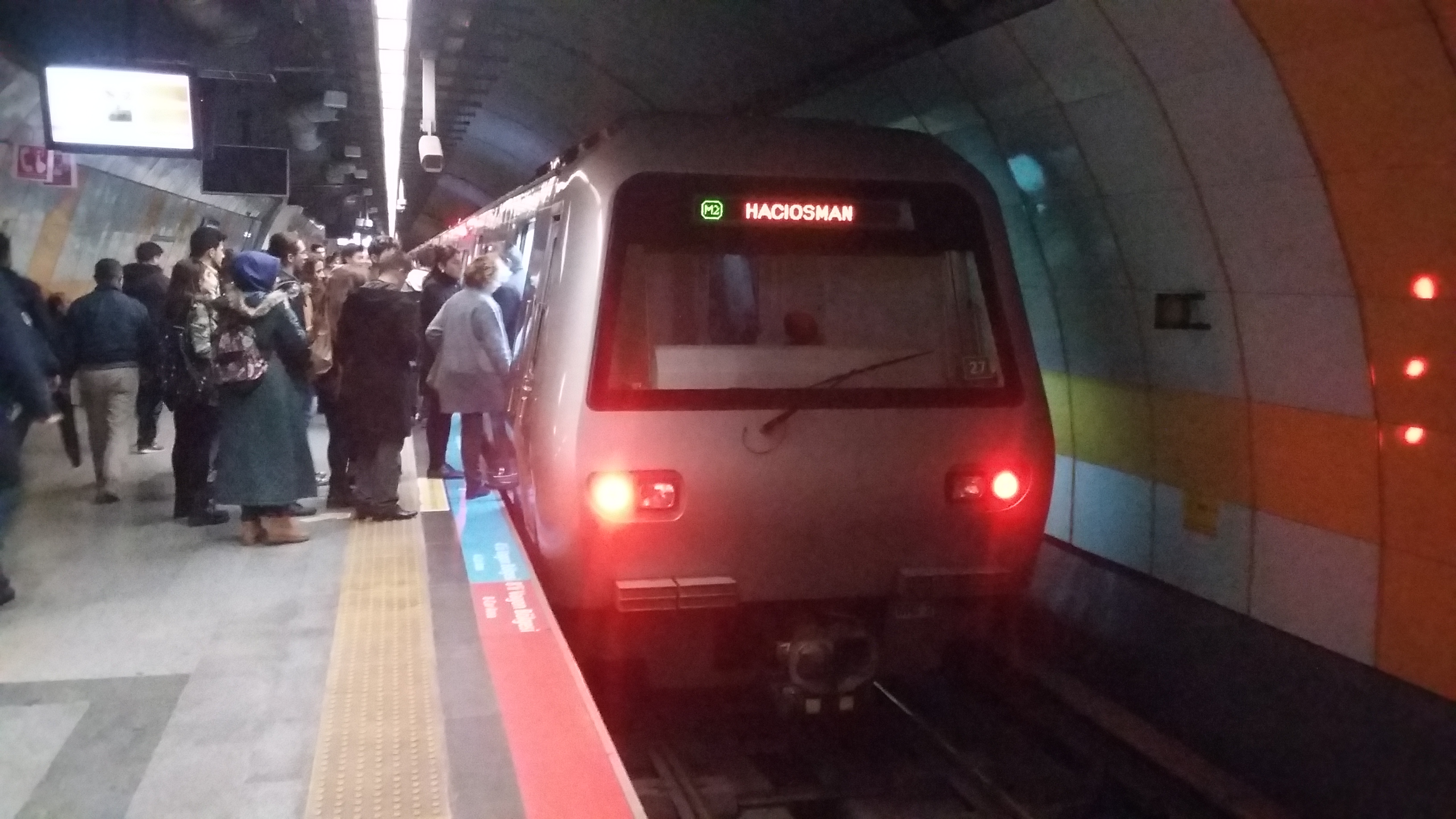 Osmanbey